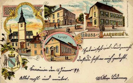 Carte postale de la ville vers 1900